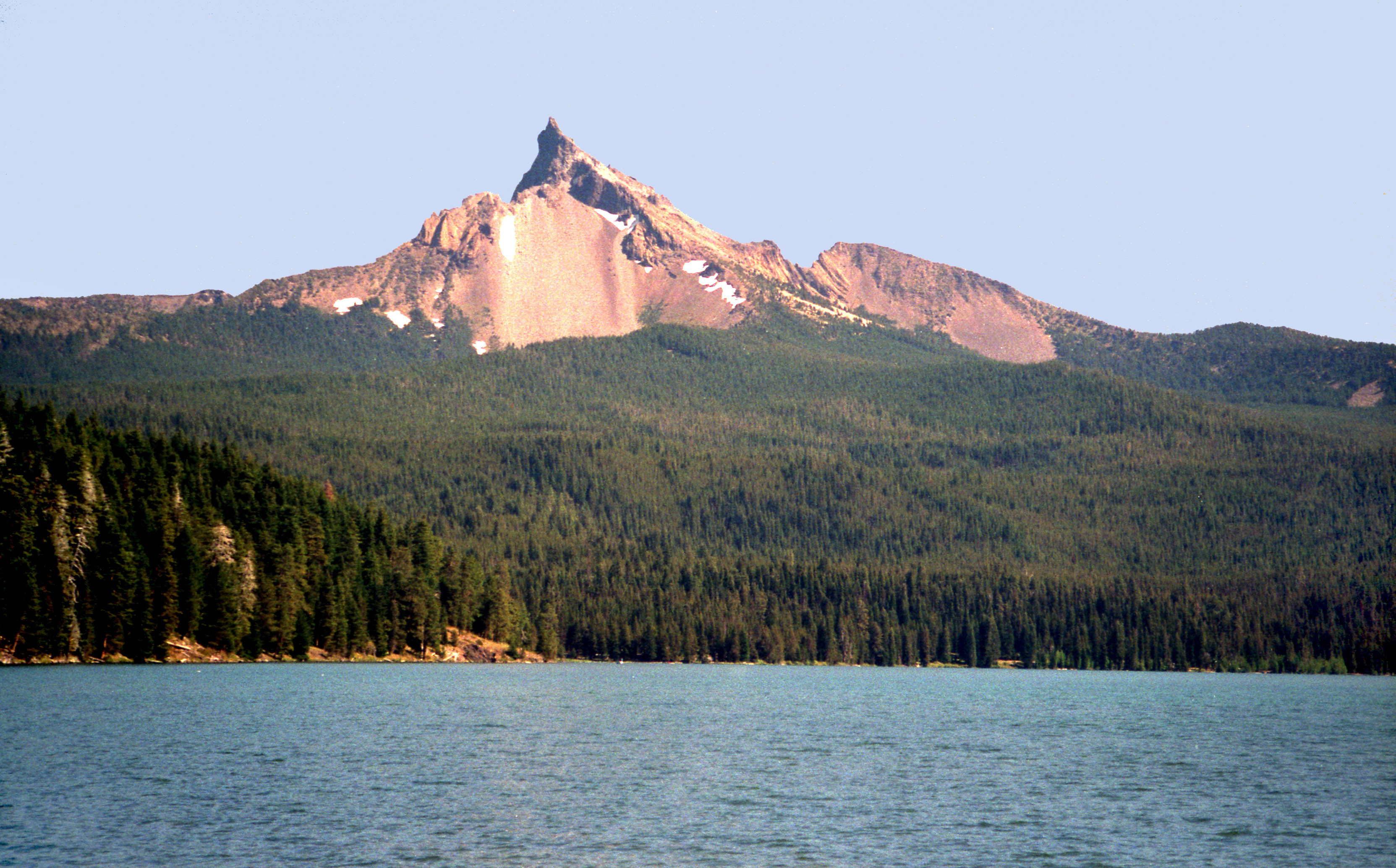 Diamond Lake - Mt Thielsen 2'799 m - Oregon